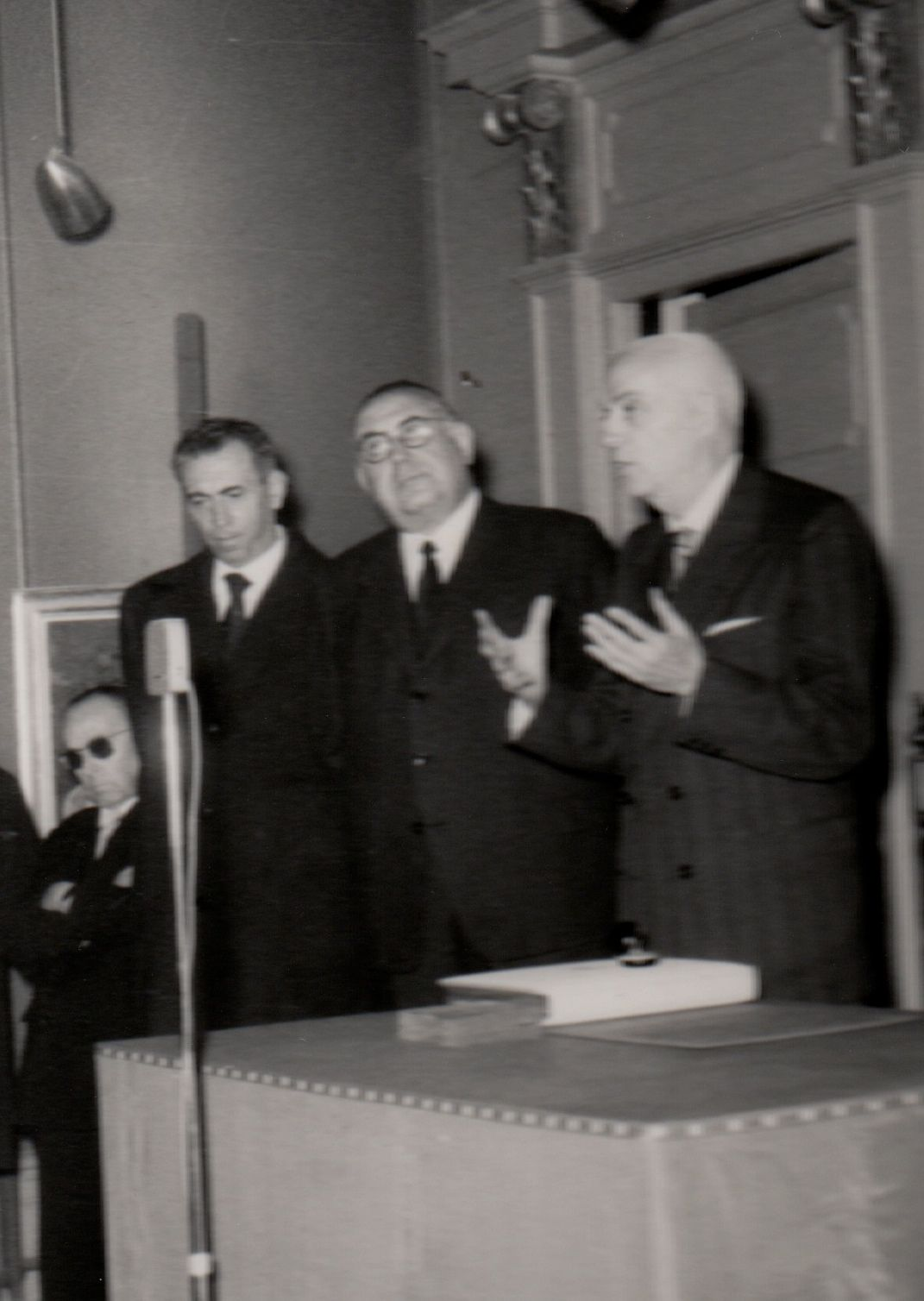 Enric Aguadé Parés en un acte de la celebració del Centenari del Centre de Lectura de Reus